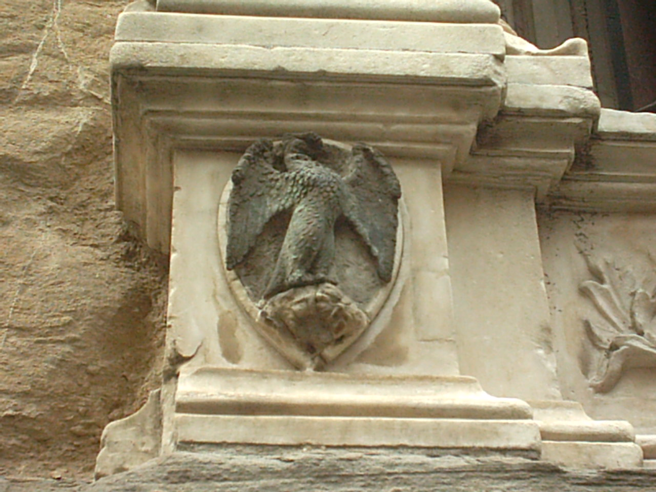 stemma dell'arte di Calimala sulla nicchia della chiesa di Orsanmichele a Firenze